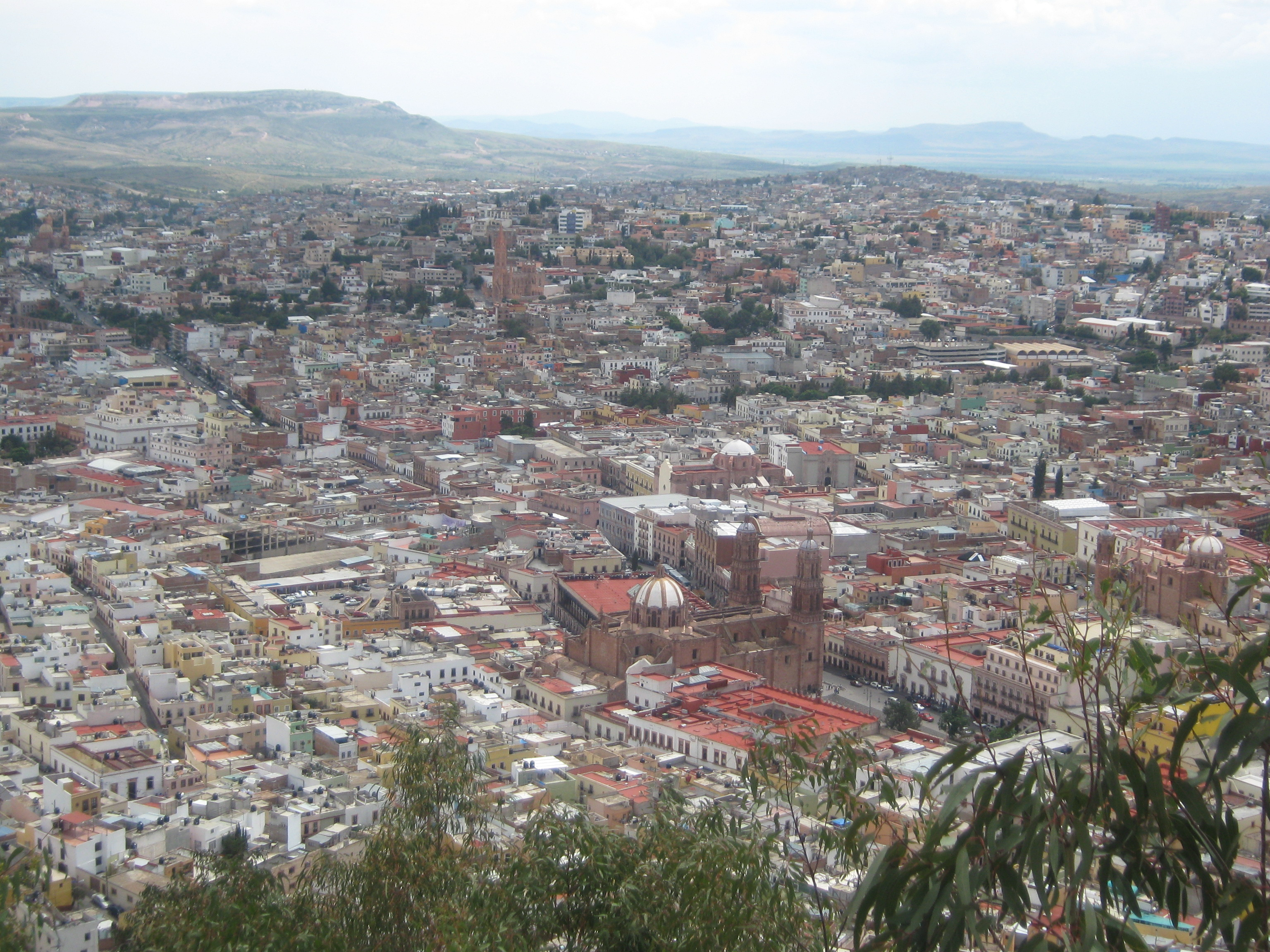 Imagen tomada desde el cerro de la bufa, en Zacatecas.